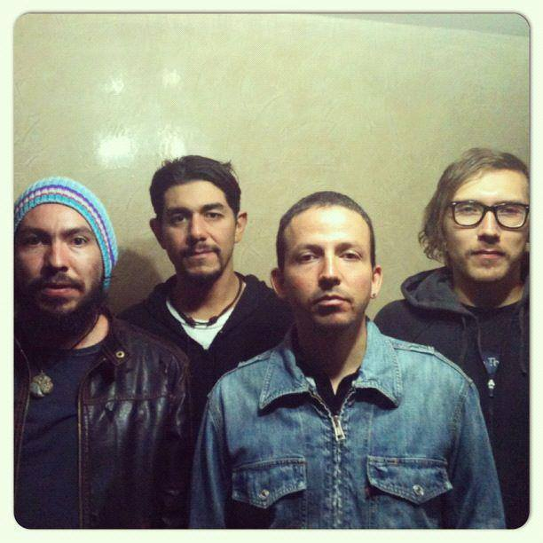 sad breakfast